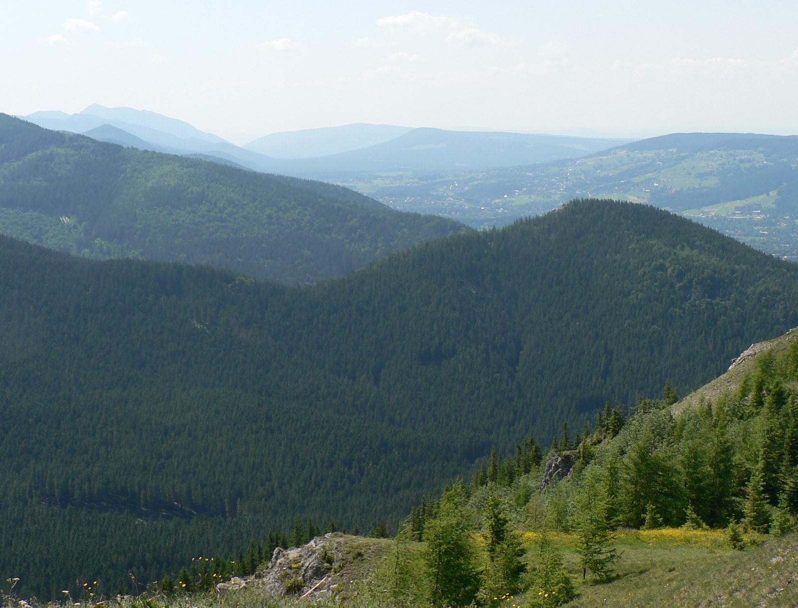 Nosalowa Przełęcz i Nosal ze szczytu Wielkiego Kopieńca